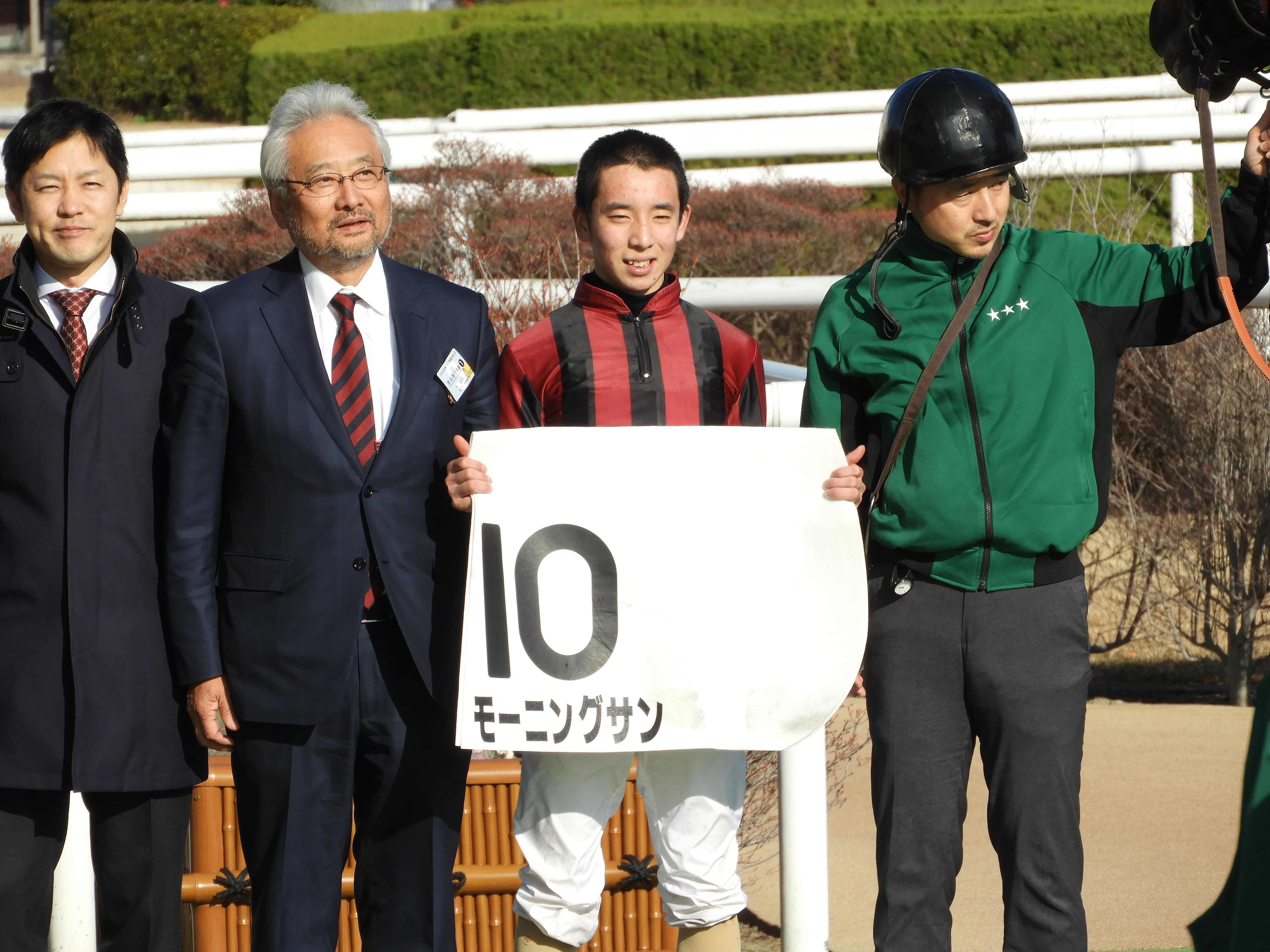 モーニングサン号の口取り式に写る団野大成騎手（2020年1月11日、京都競馬場ウィナーズサークル）